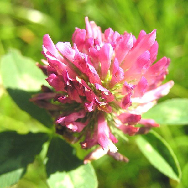 Roter Klee. Von mir selbst fotografiert.